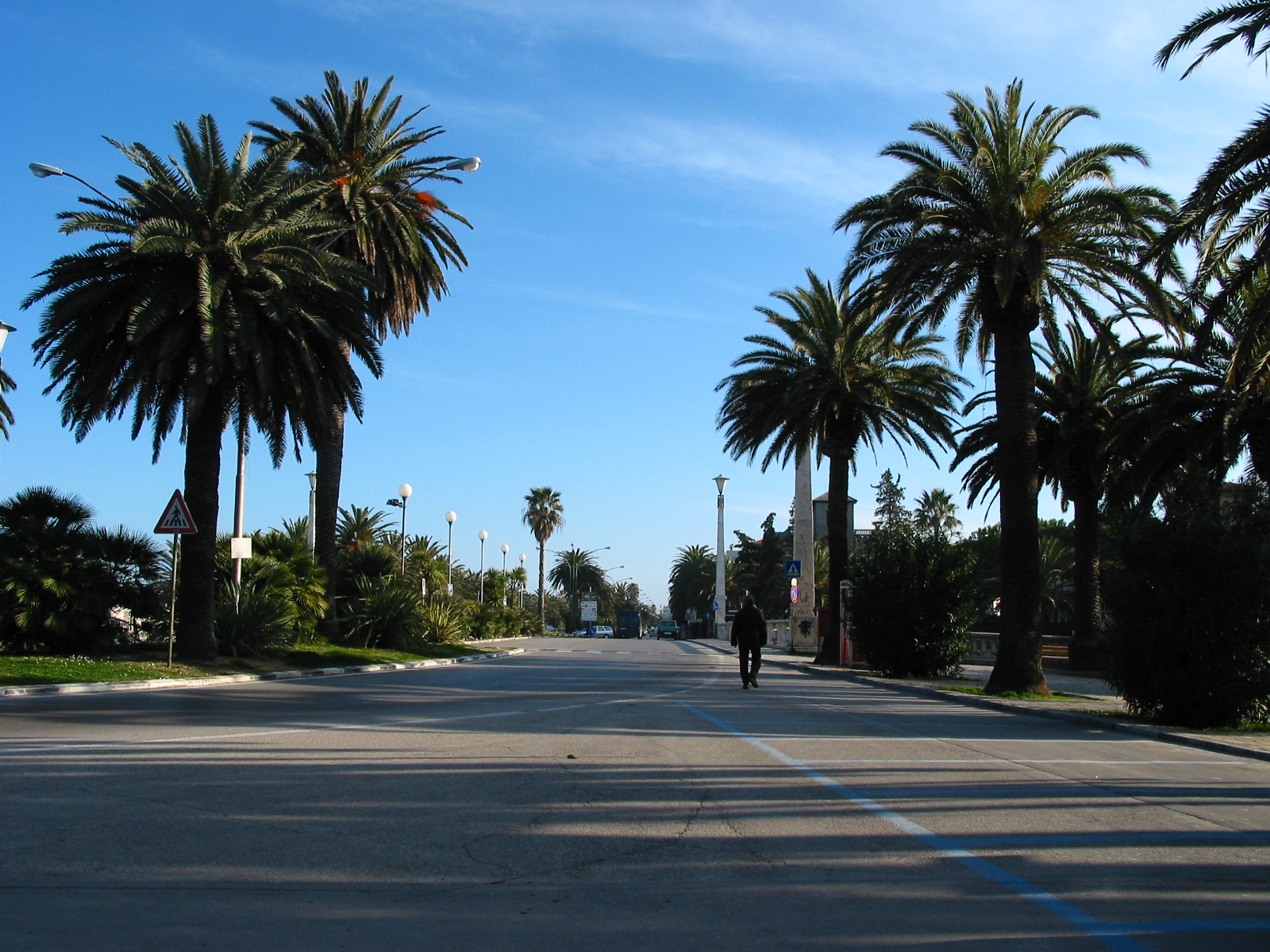 Lungomare. S. Benedetto - Tratto finale del lungomare nord.